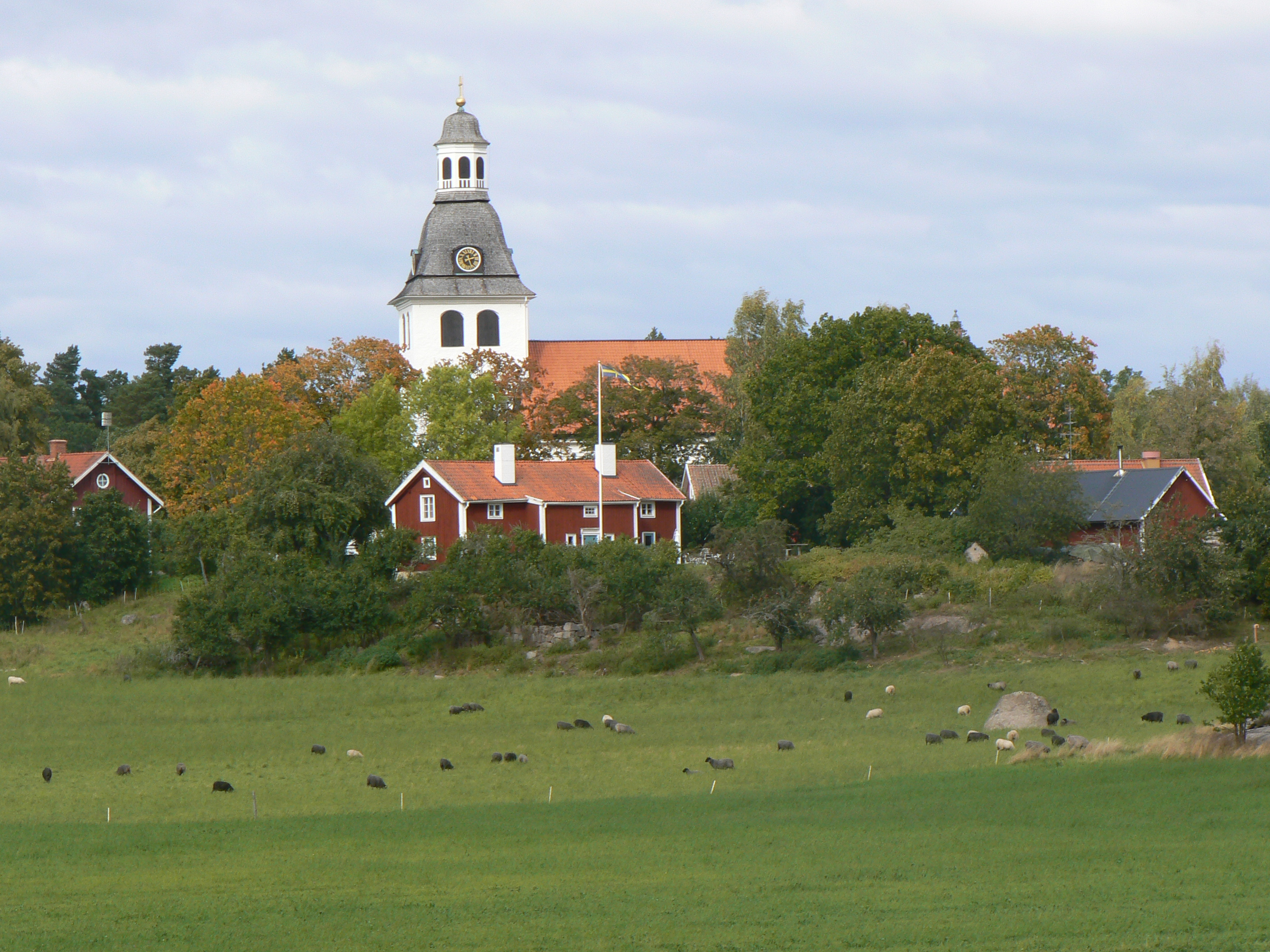 Vårdnäs church in Östergötland, Sweden